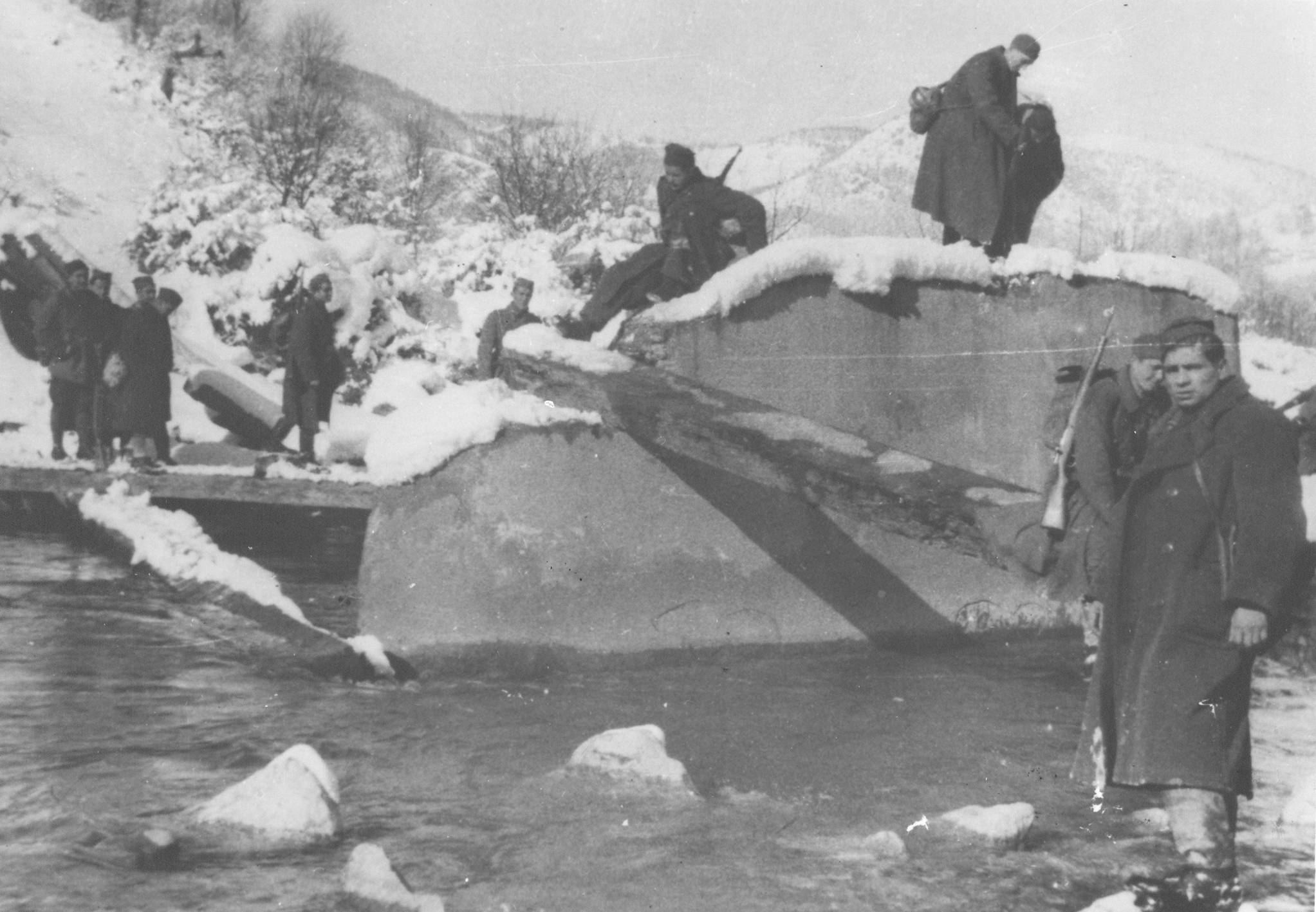 Srpskohrvatski / српскохрватски: Borci 16. muslimanske brigade prelaze reku Drinjaču kod Vlasenice za vreme VI neprijateljske ofanzive, decembra 1943.